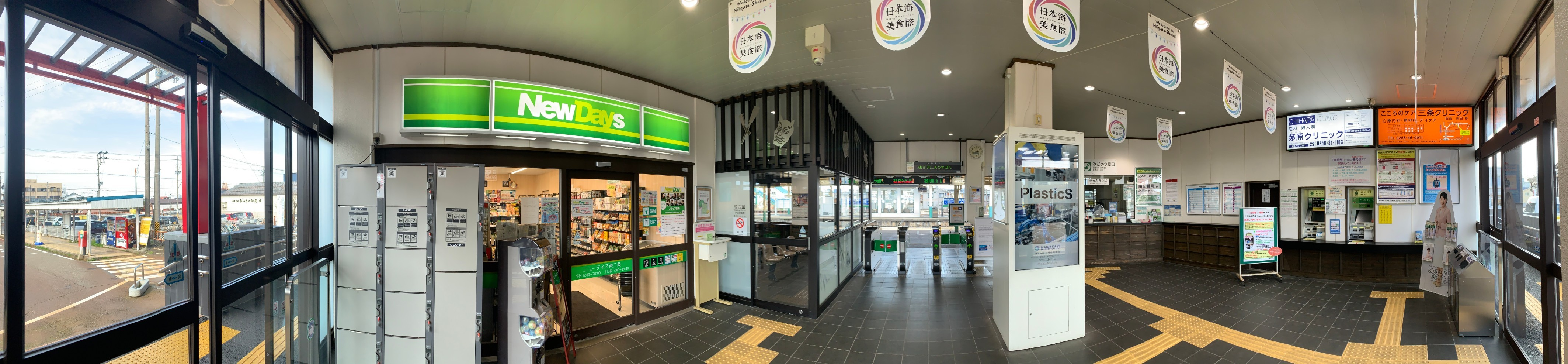 東三条駅 改札口周辺（2020年3月）